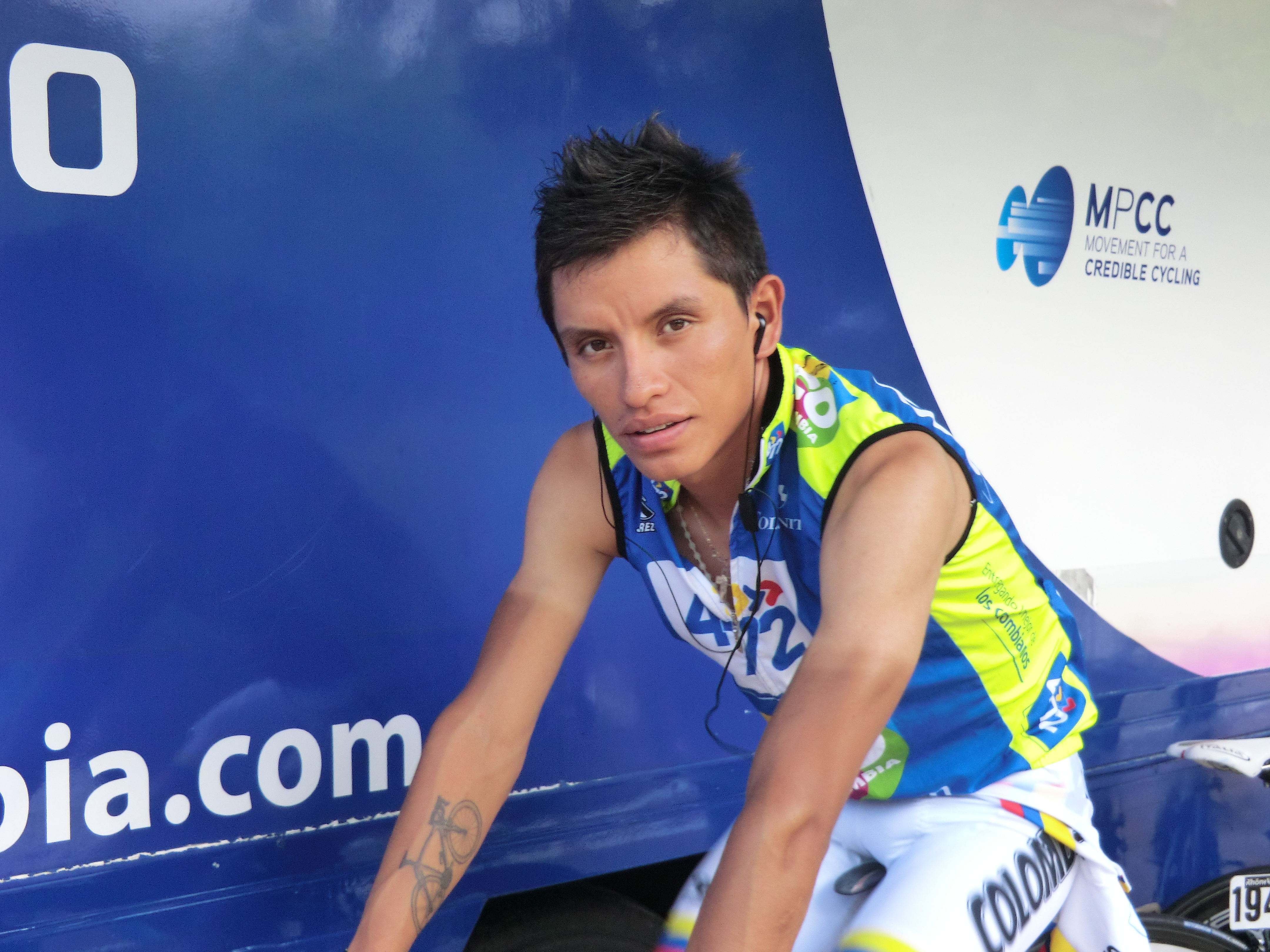 Photographié à Trévoux, au cours de l'après-midi précédent le départ du prologue (18 h) du Tour de l'Ain 2013.